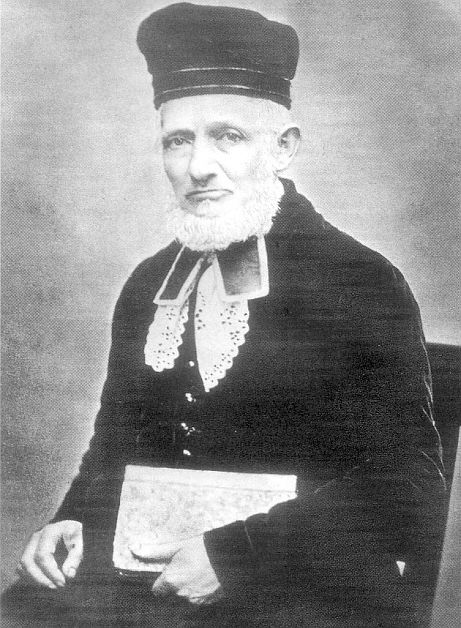 Distriktsrabbiner Josef Gabriel Adler (geb. 1802; gest. 1873)